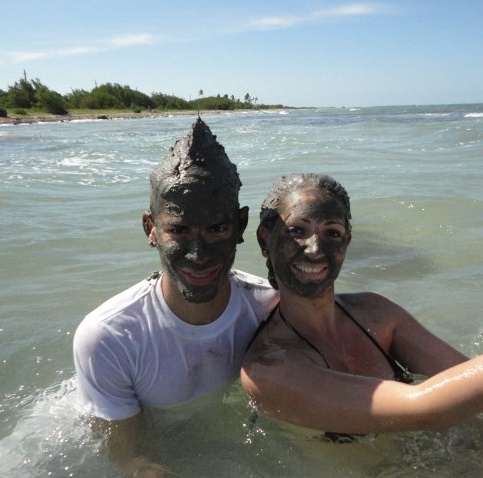 uso medicinal del barro